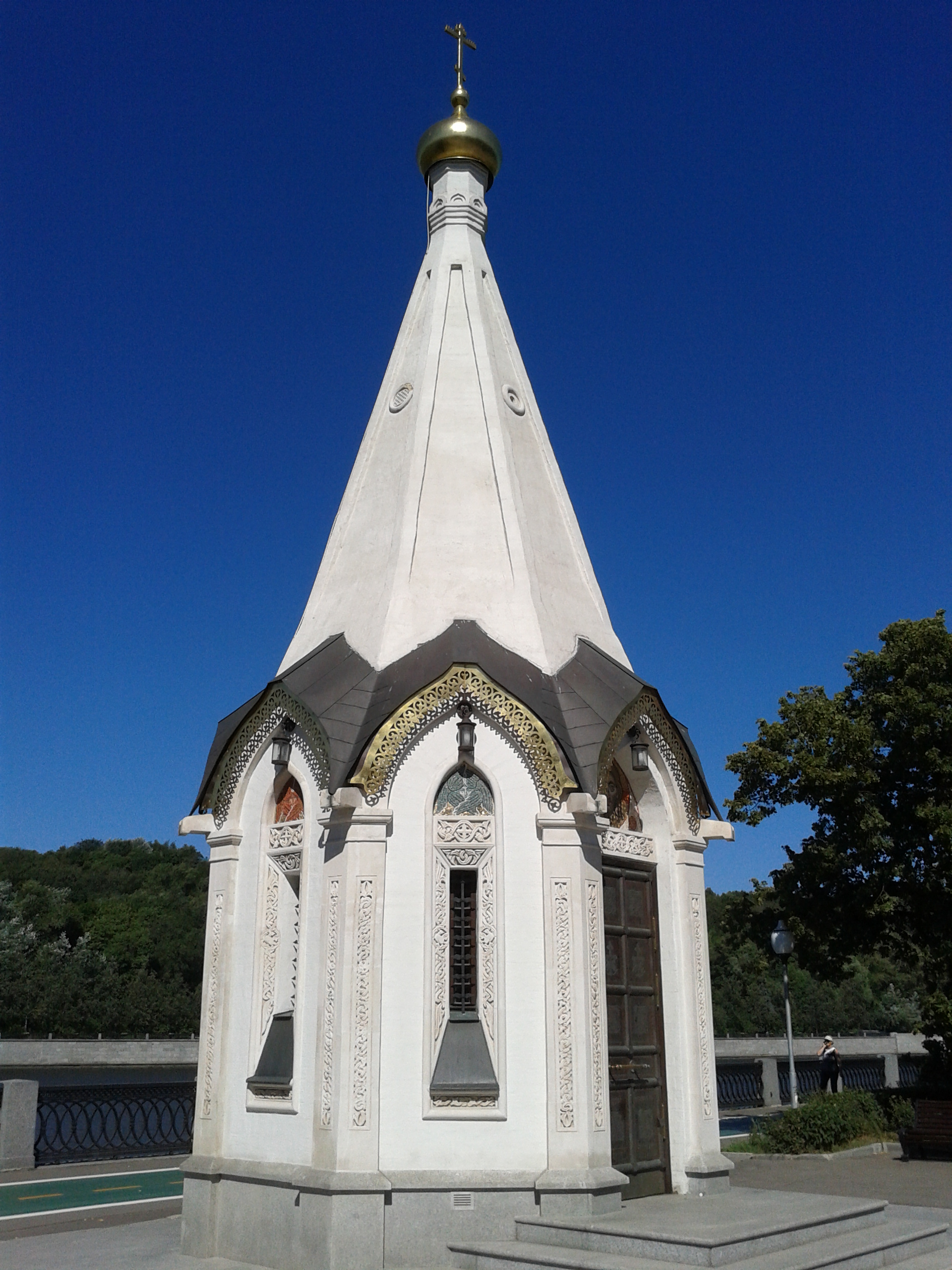 Часовня равноапостольного князя Владимира в Лужниках. Сзади часовни через Москву-реку видны Воробьёвы горы